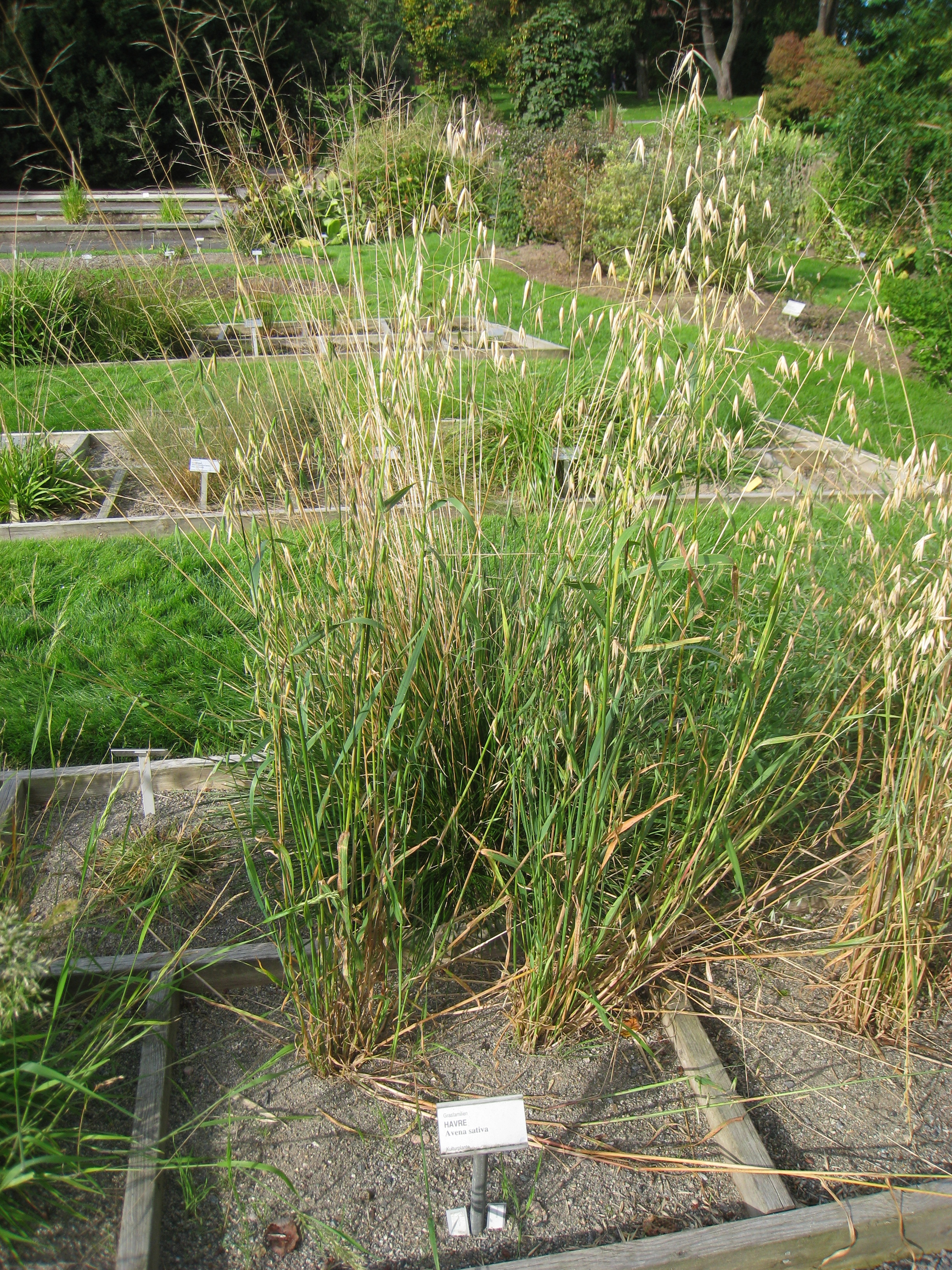 Avena sativa - Oslo botanical garden, Oslo, Norway.